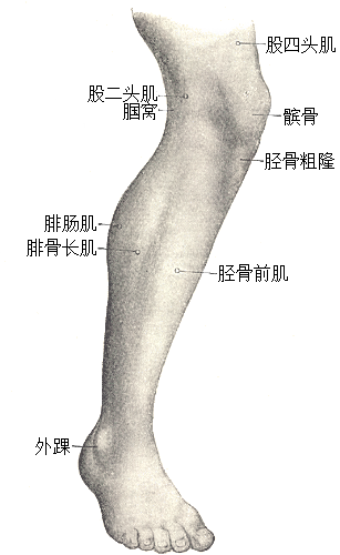 右腿侧面